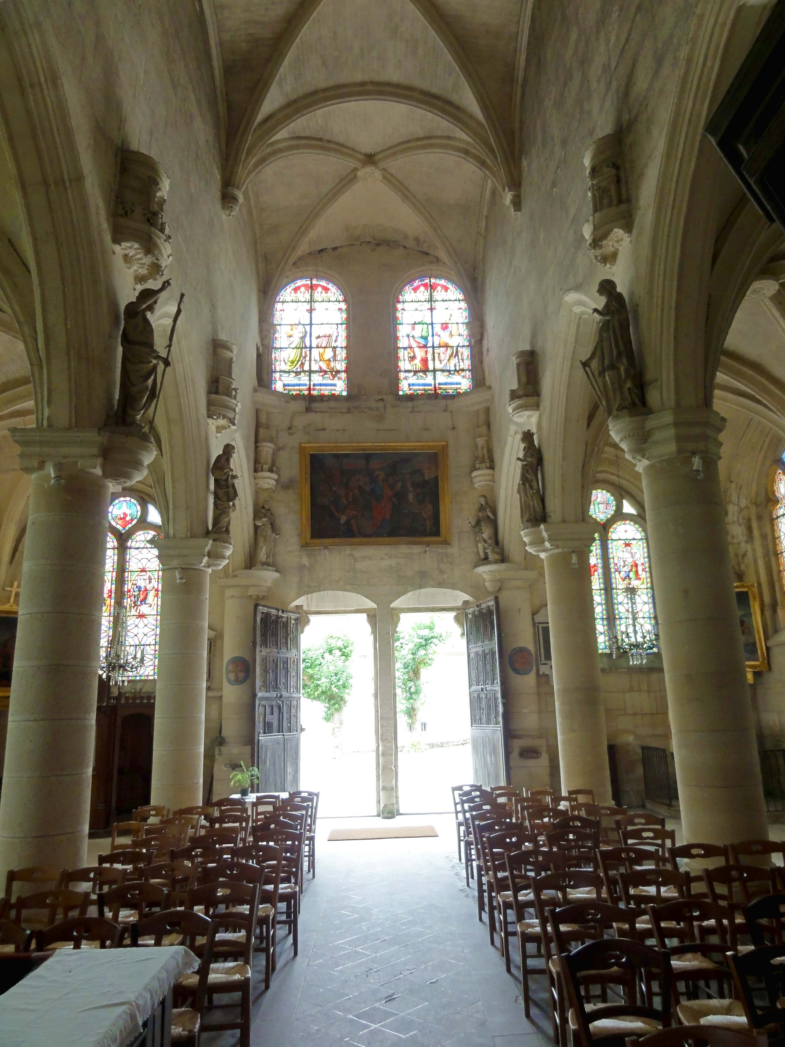 Intérieur de l'église (voir titre).